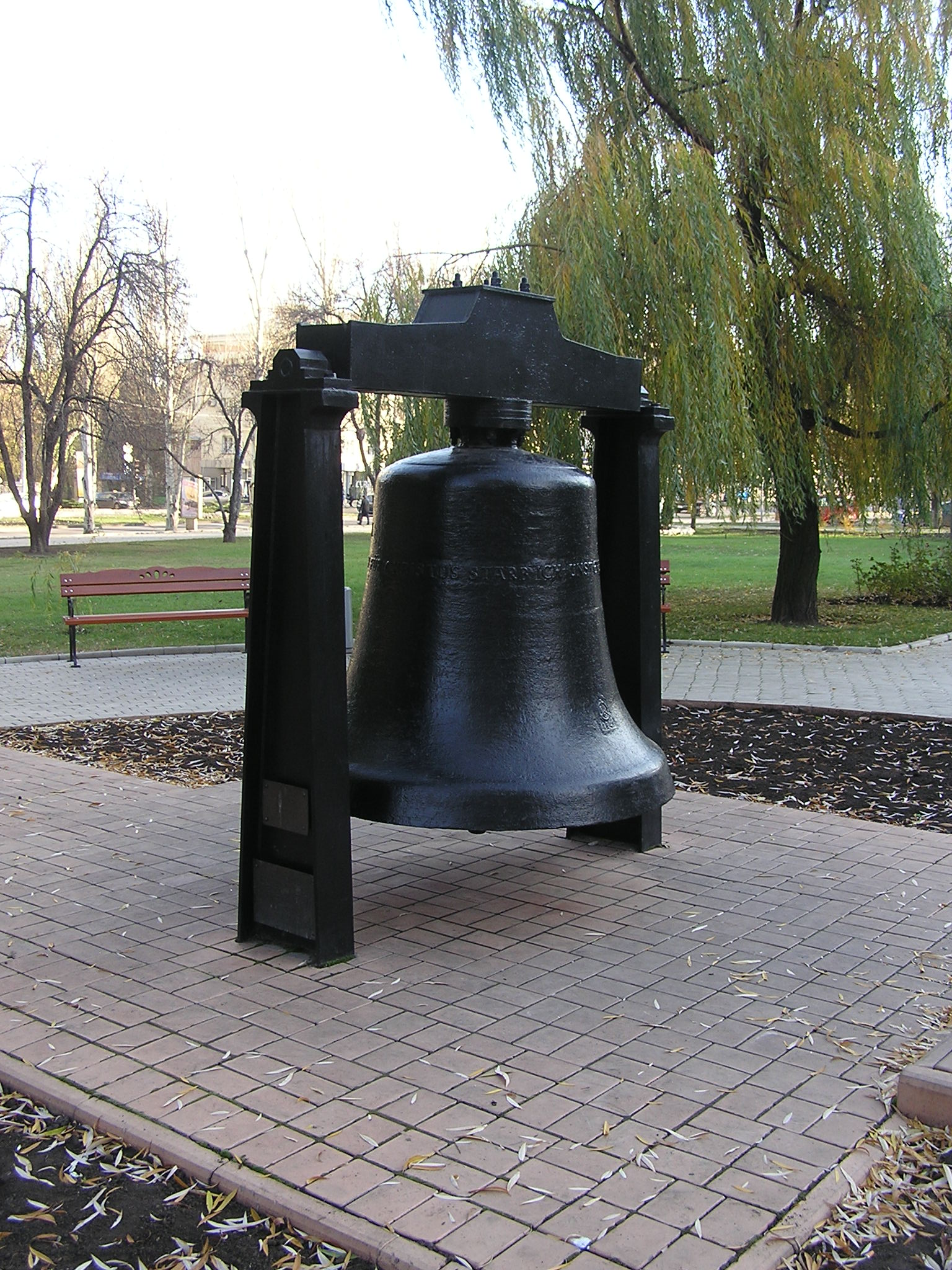 Донецк. Бохумский колокол